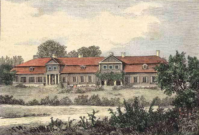 Беларуская (тарашкевіца): Варонча (Varonča), сядзіба Несялоўскіх (Niesiałoŭski)